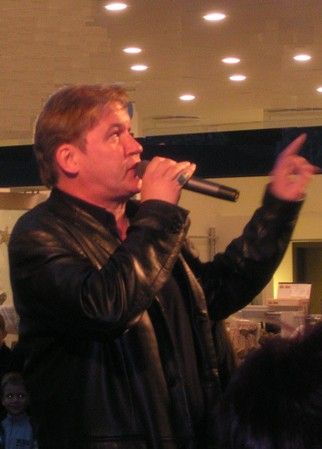 Johnny Logan, live, 3/12 2005, Ro's torv, Roskilde, Denmark